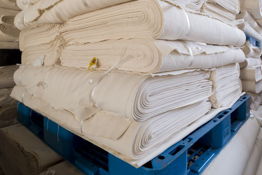 倉敷帆布の生産拠点である丸進工業株式会社（岡山県倉敷市）内の出荷場。織り上がった帆布生地を約50m単位で畳み、出荷を待つ状態。